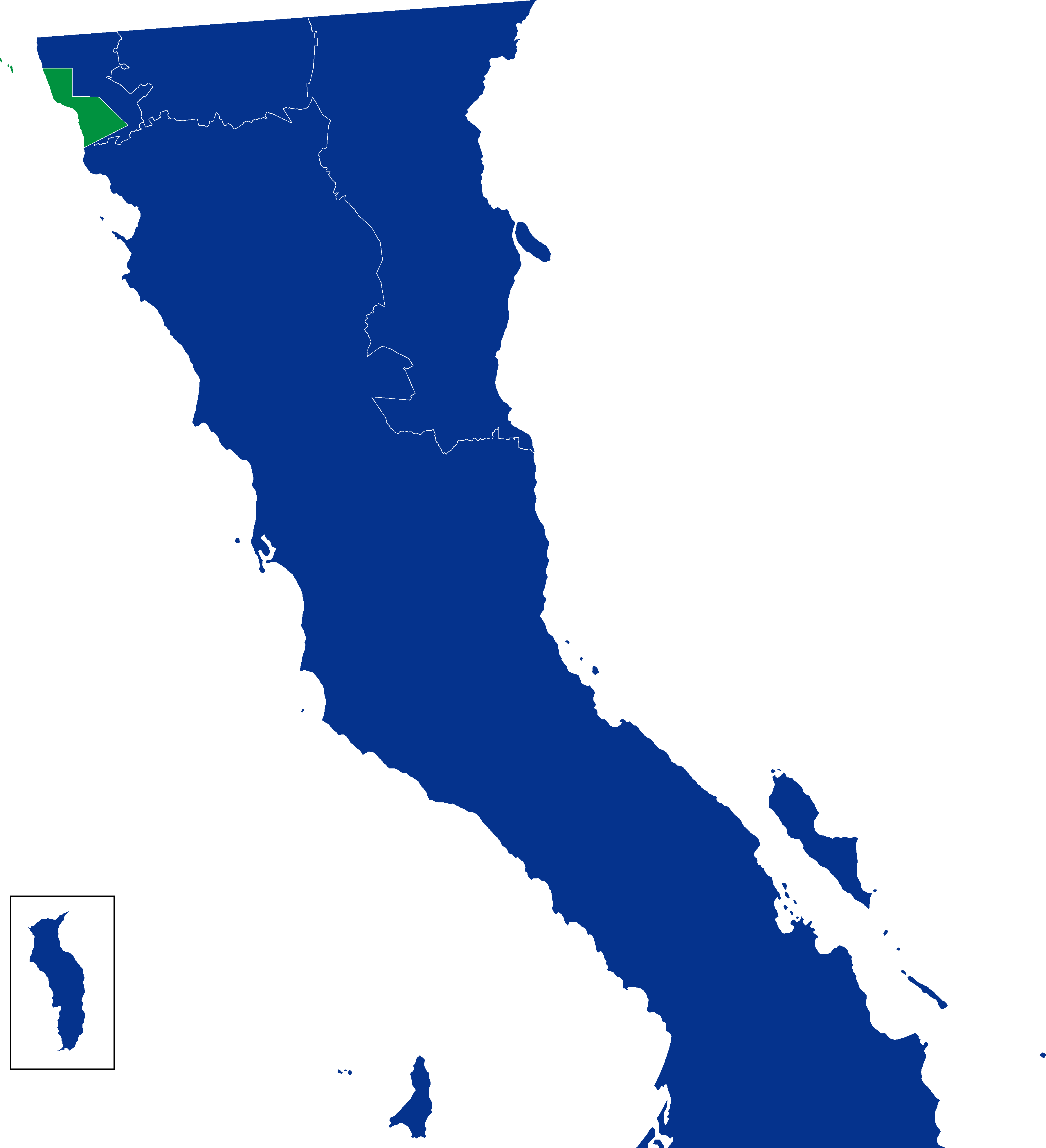 Resultados de la elección a Ayuntamientos por partido político en el estado de Baja California, México en 2007.